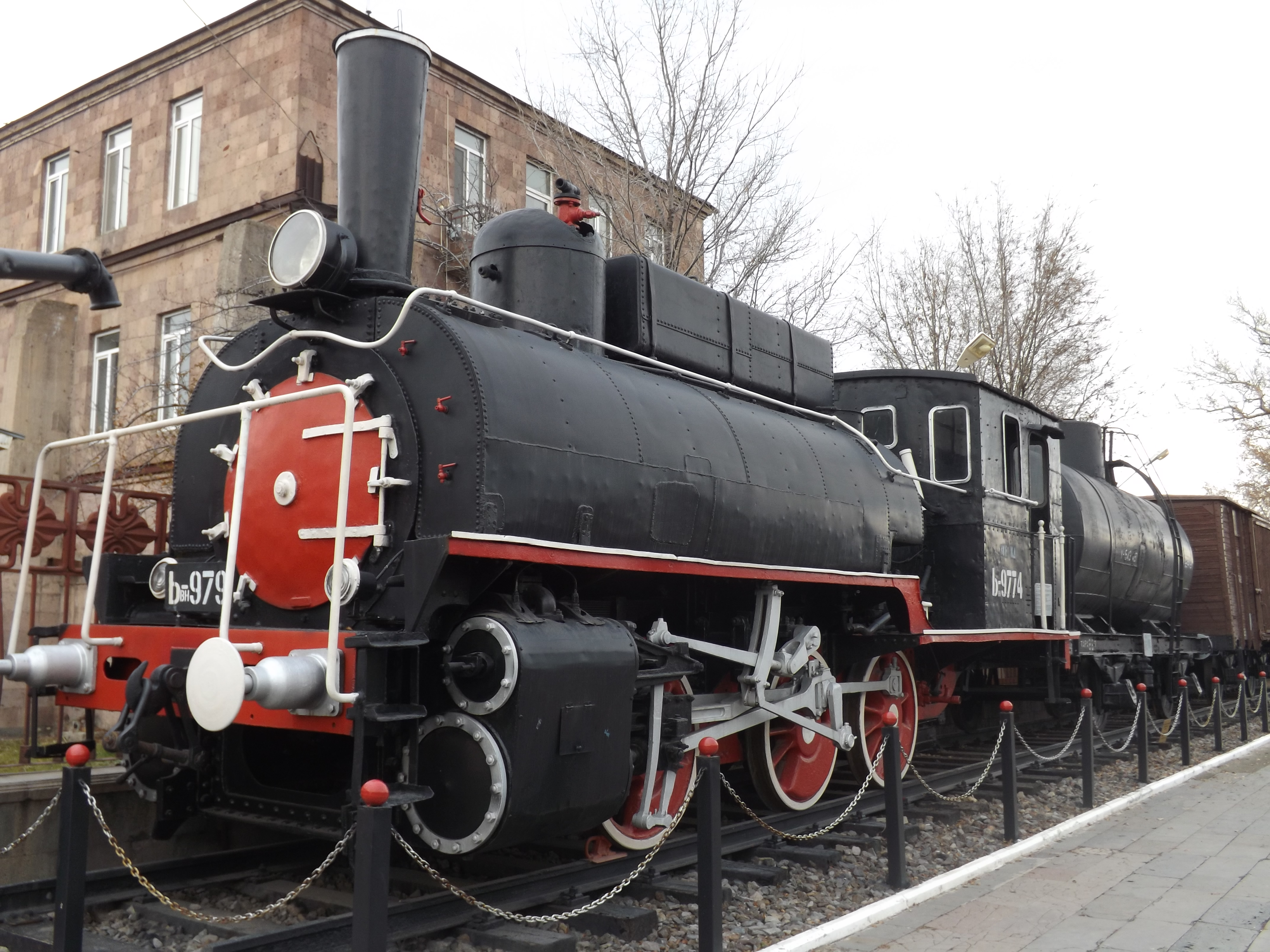 Գյումրիի Երկաթգծի Կայարանին կից թանգարան